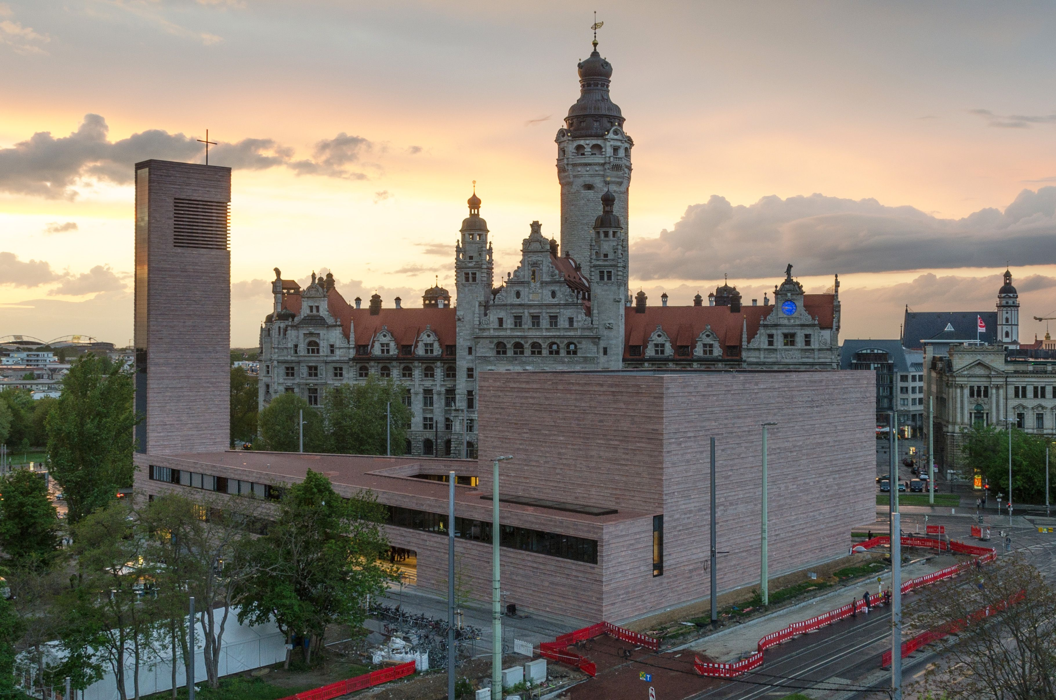 Neue Propsteikirche St. Trinitatis am 9. Mai 2015, dem Tag ihrer Weihe. Im Hintergrund das Neue Rathaus.